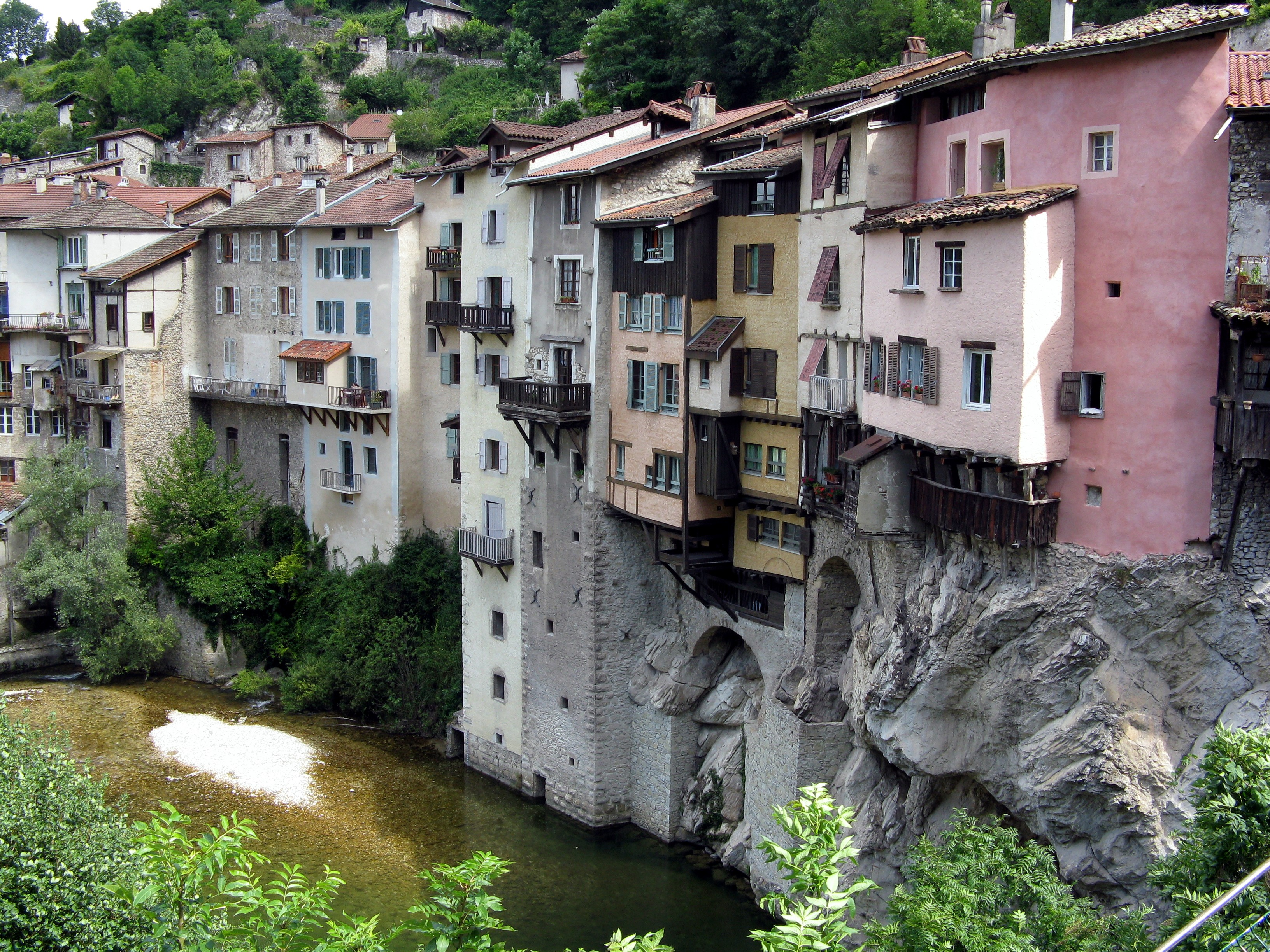 Pont en Royans - Village